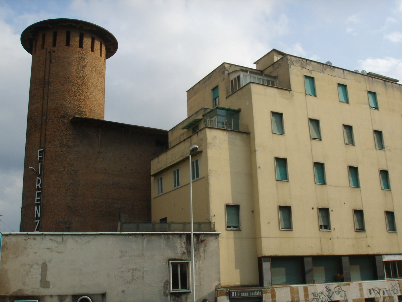 Stazione smn squadra rialzo